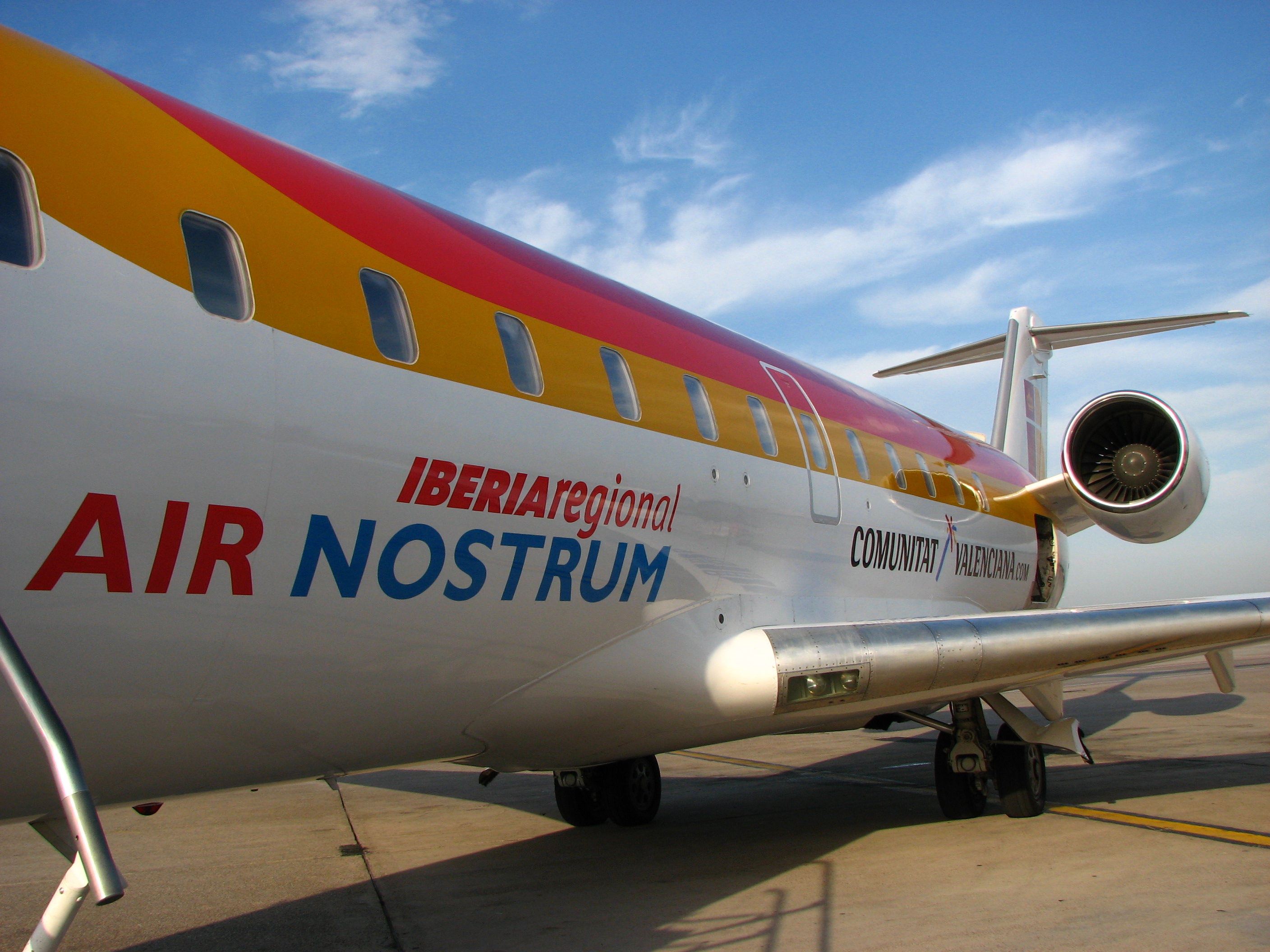 Avión de Air Nostrum que cubre la ruta Barcelona - Badajoz.